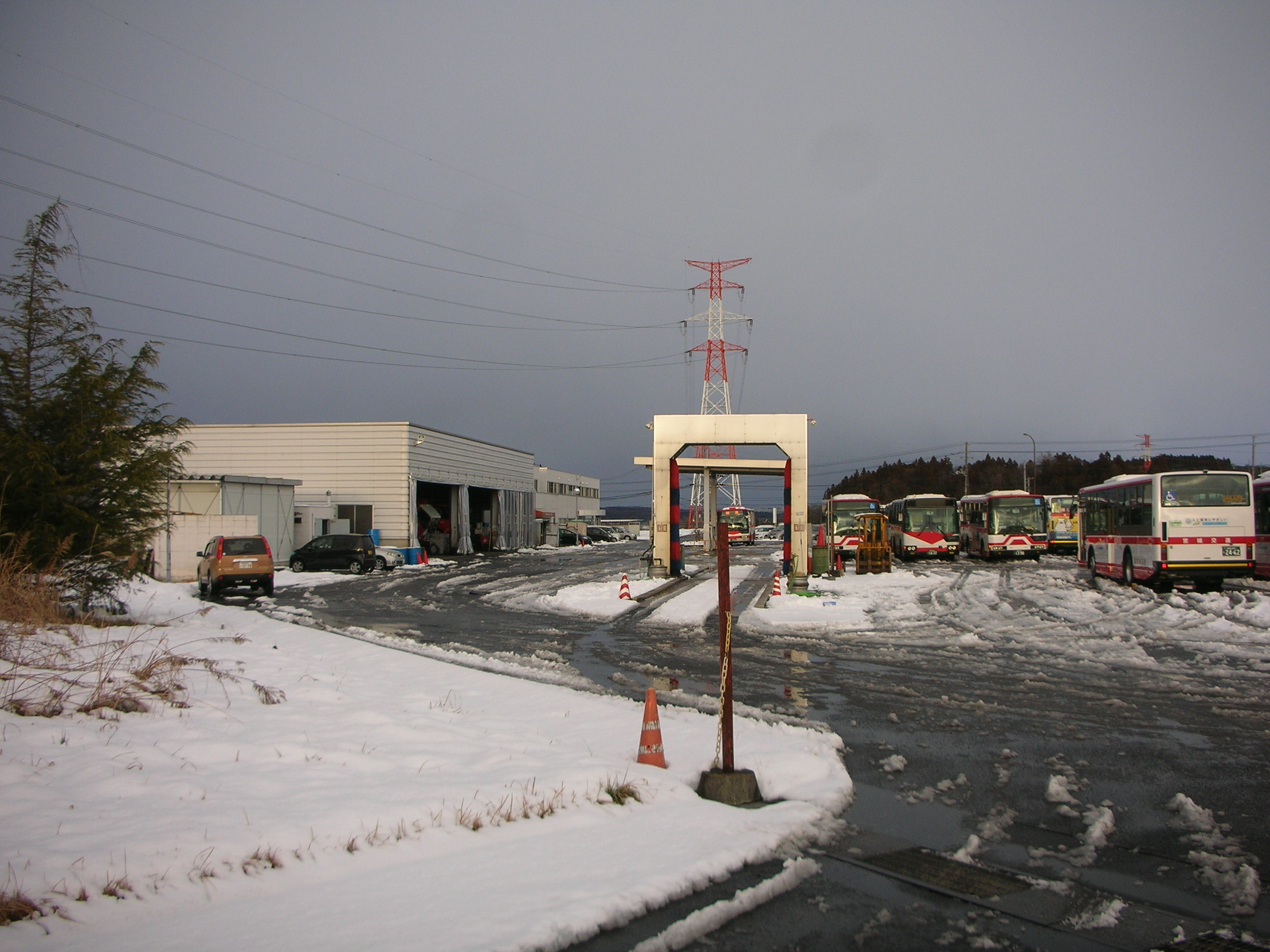 宮城交通 富谷営業所